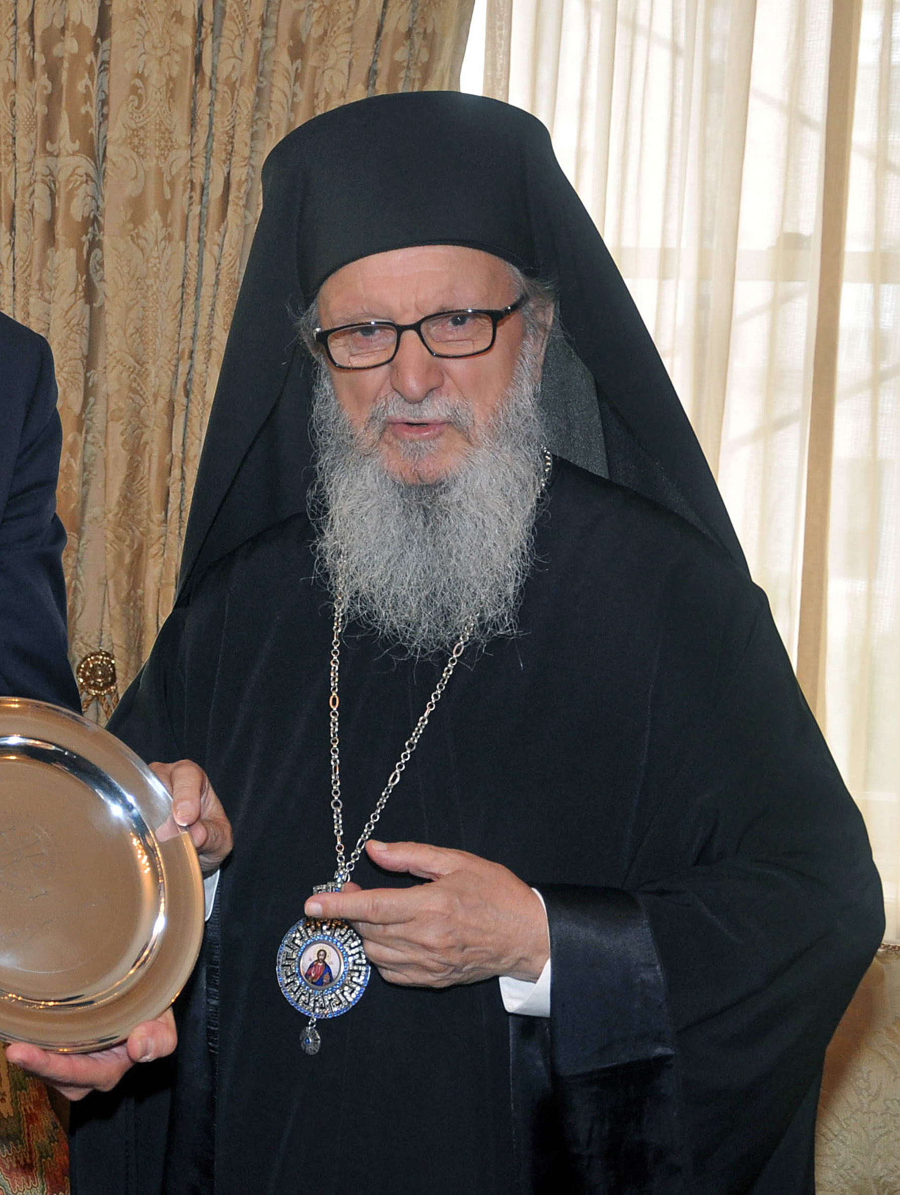 Συνάντηση ΥΠΕΞ Σ. Λαμπρινίδη με τον Αρχιεπίσκοπο Αμερικής κ.κ. Δημήτριο (Νέα Υόρκη, 17.09.2011) (Πηγή: ΕTA PRESS)